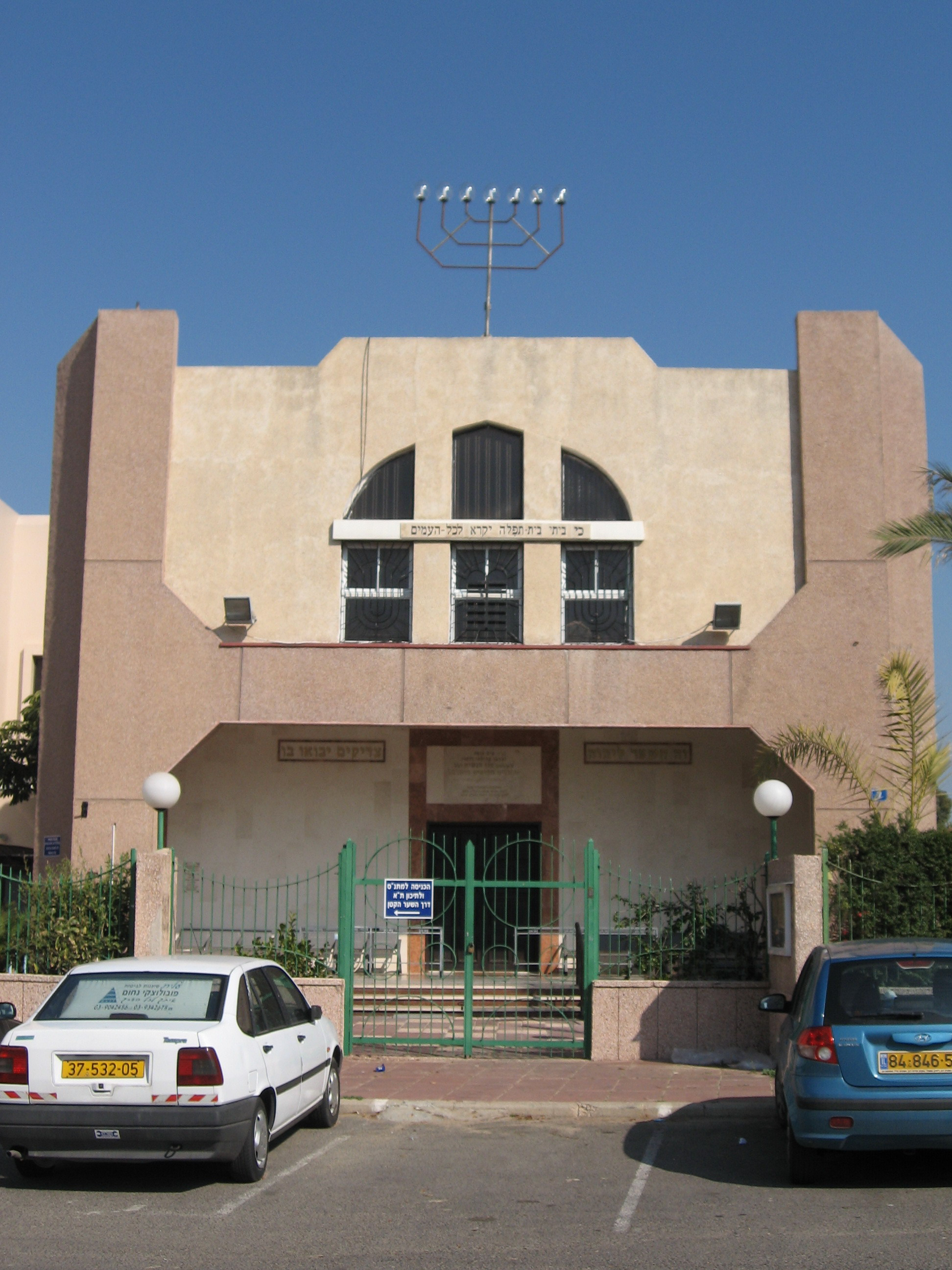 Karaim Sinagogue in Ashdod